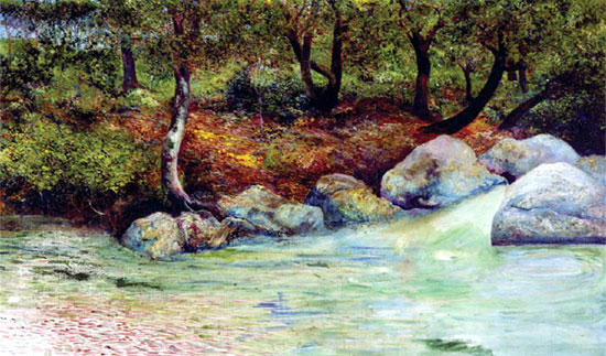 Paisaje con bosque y río